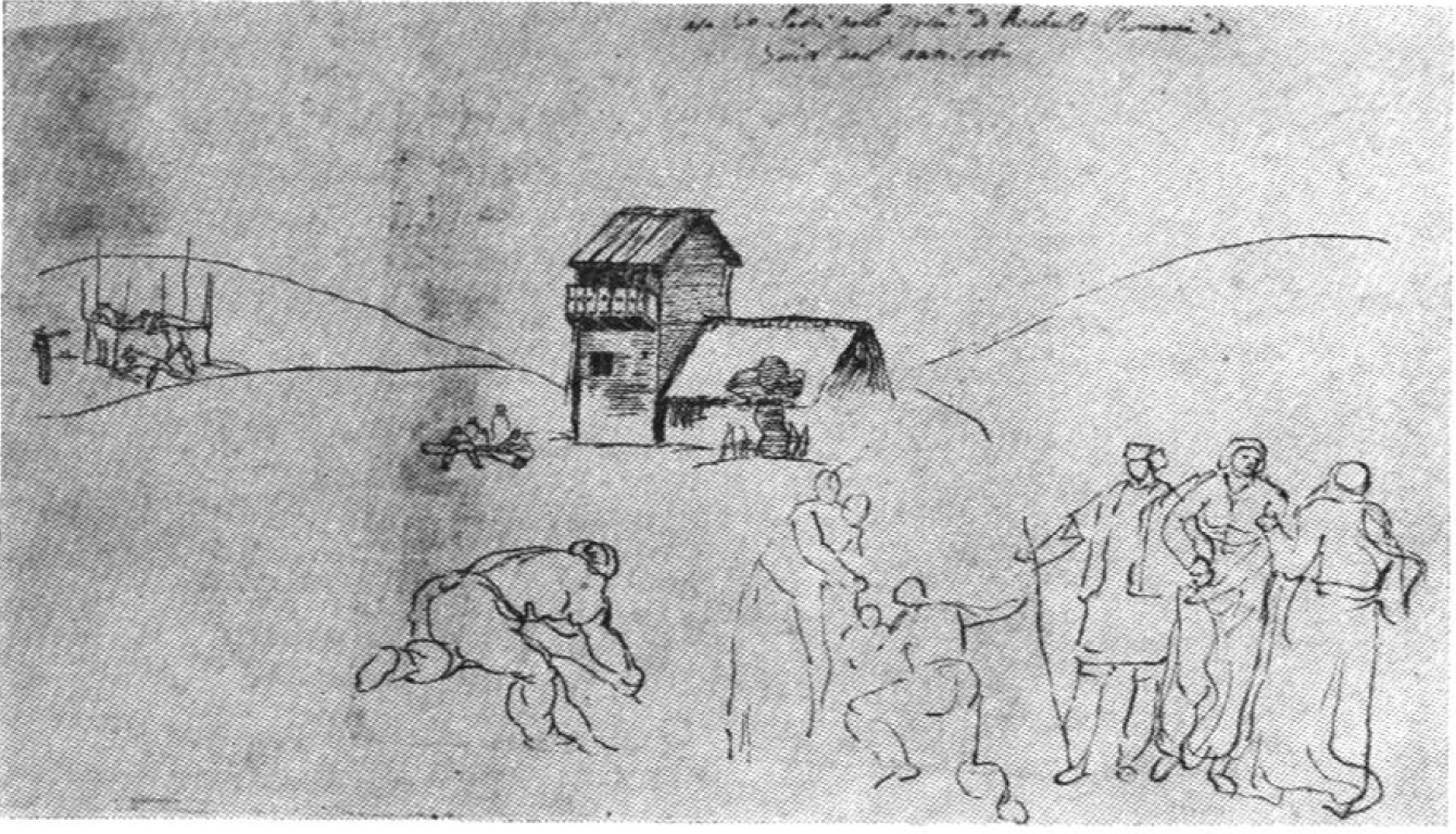 მისიონერების სახლი სოფელ რეკულში